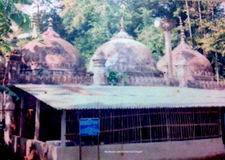 কদিমহামজানি মসজিদ